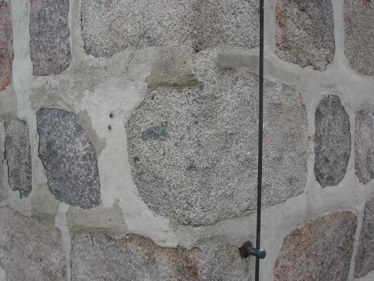 Nærbillede af skakbrætsten på Frankena kirke i tårnets SV-hjørne - stenen har kun mønster på én side